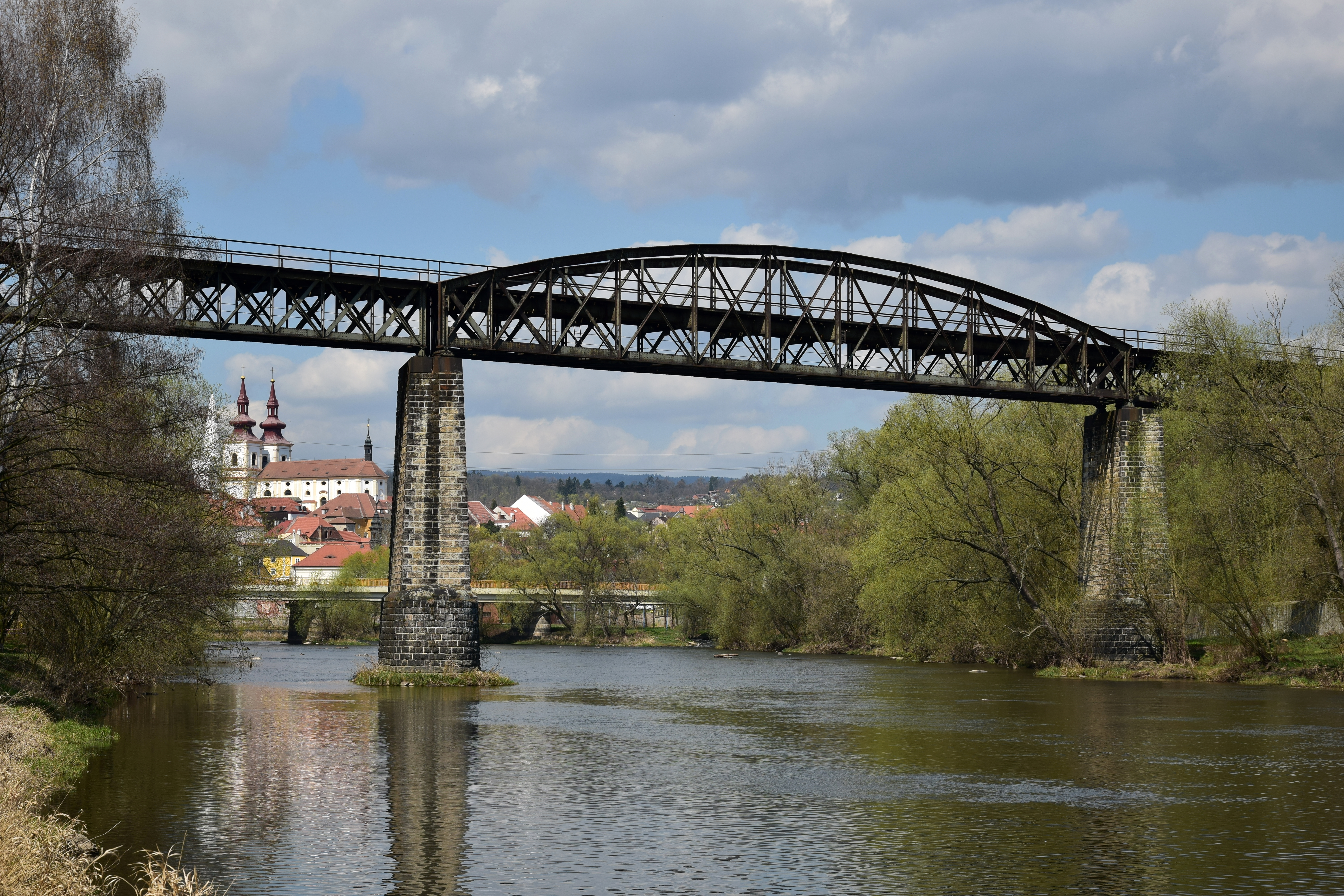 Kadaň – železniční most přes Ohři na trati Kadaň – Vilémov u Kadaně